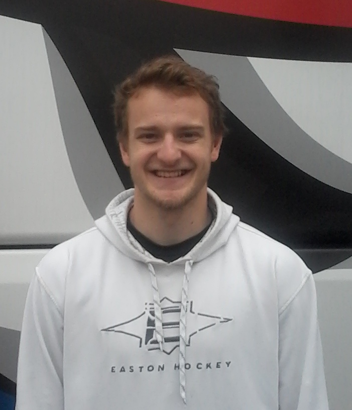 David Květoň (11.9.2015) před prvním zápasem extraligy sezony 2015/2016 s HC Oceláři Třinec